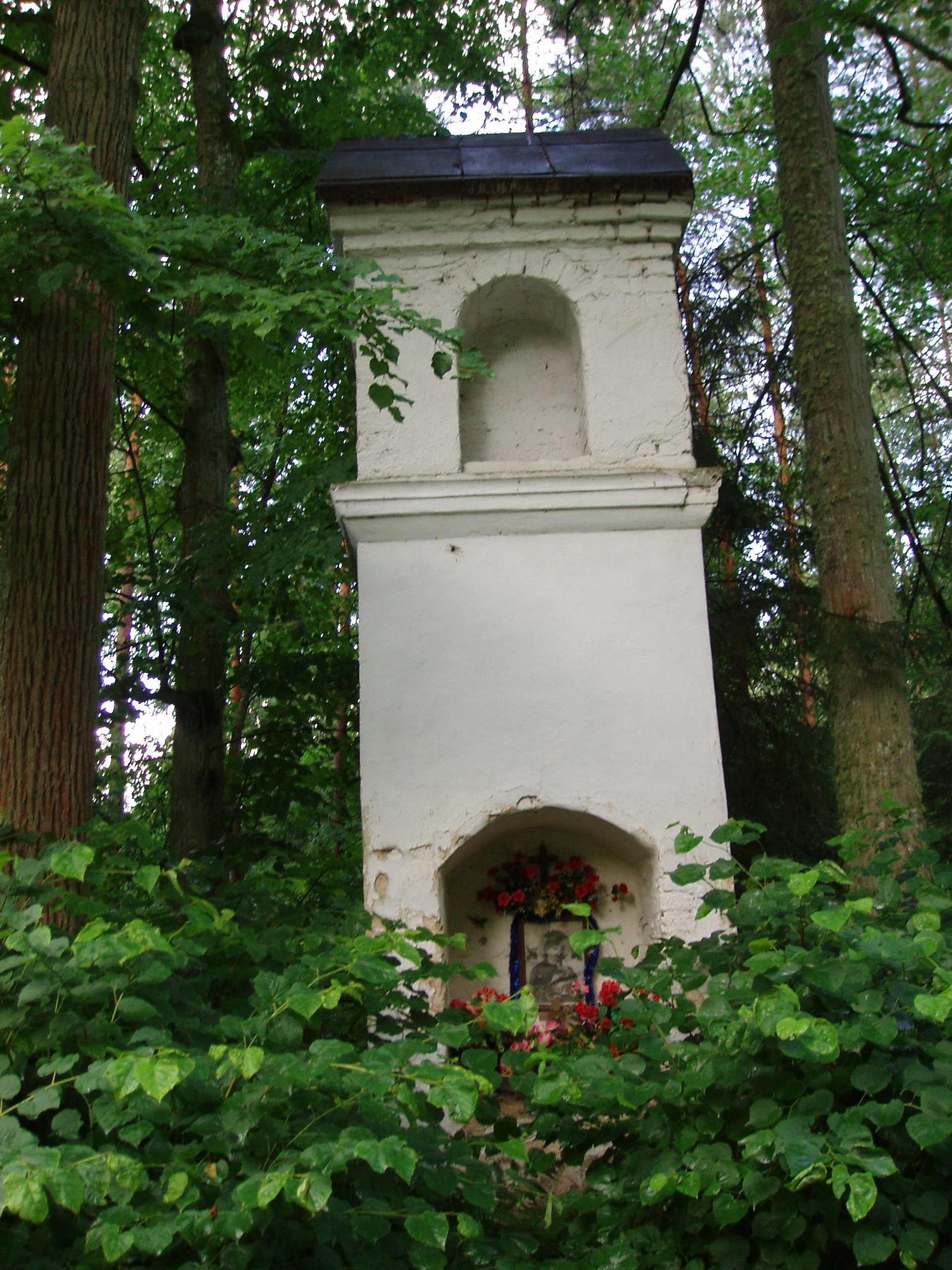 Zapomniana kapliczka w lesie (na skraju lasu), droga z Miedzylesia do Swajnie i Kochanówki